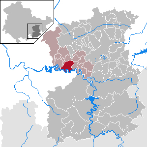 Gössitz in Thuringia - Saale-Orla-Kreis